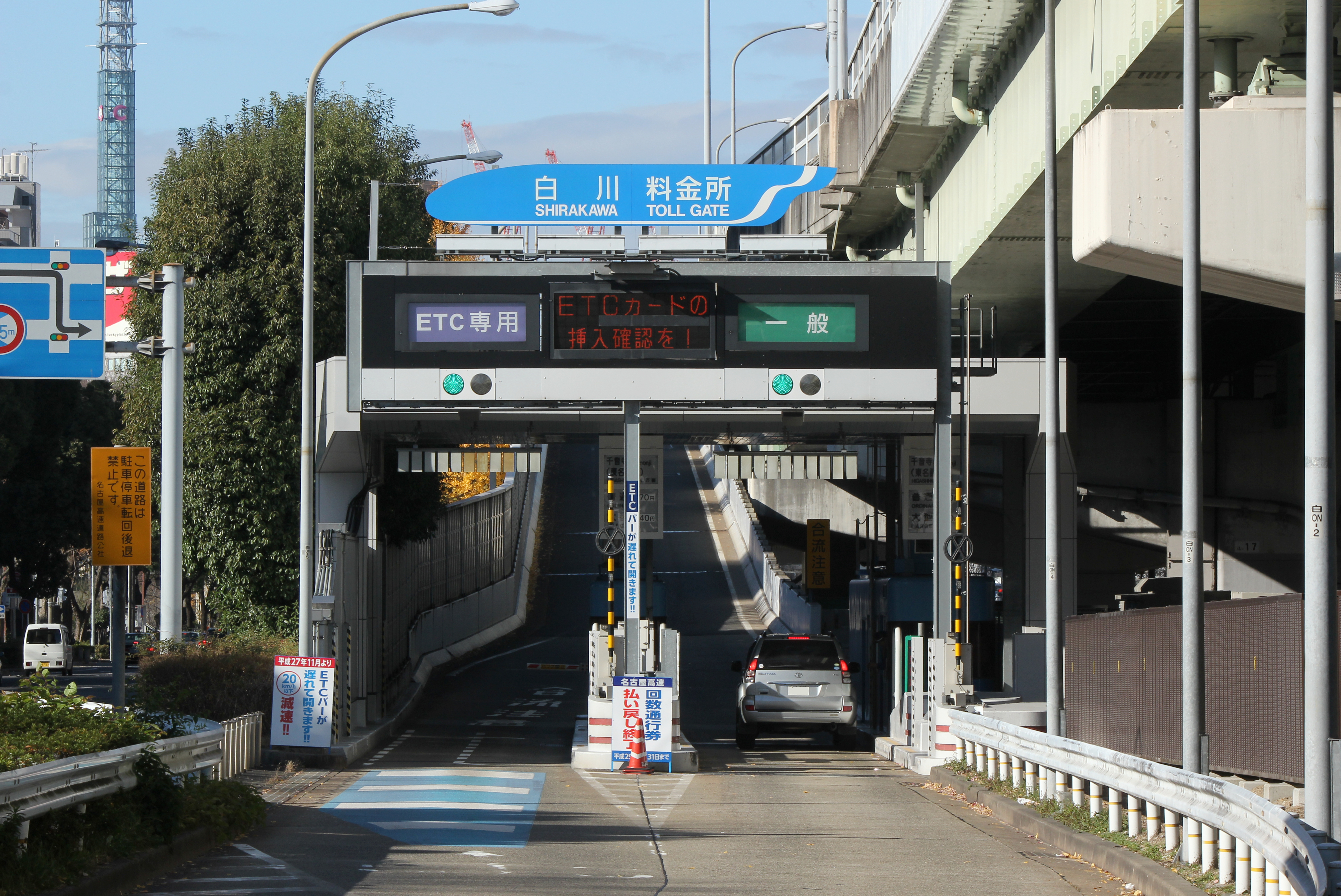 名古屋高速 白川料金所